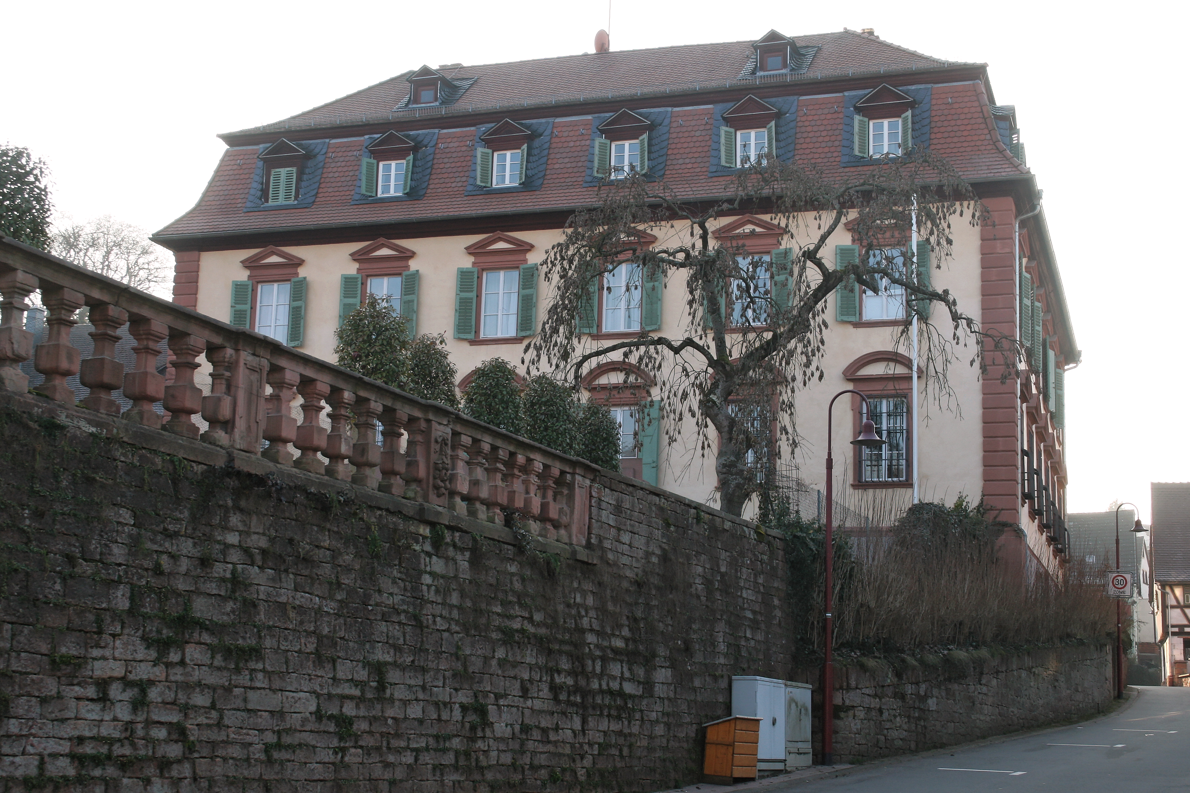 Schloss in Laudenbach (Bayern), erbaut im 18. Jahrhundert.